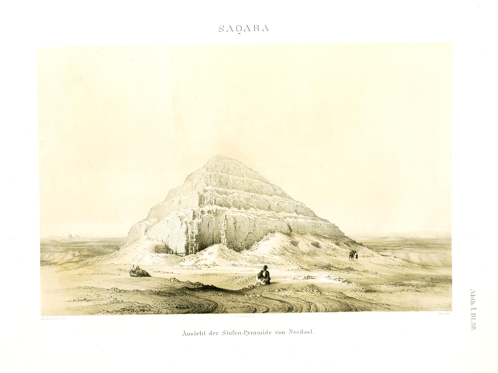 Denkmaeler aus Aegypten und Aethiopien nach den Zeichnungen der von Seiner Majestät dem Koenige von Preussen, Friedrich Wilhelm IV., nach diesen Ländern gesendeten, und in den Jahren 1842–1845 ausgeführten wissenschaftlichen Expedition auf Befehl Seiner Majestät